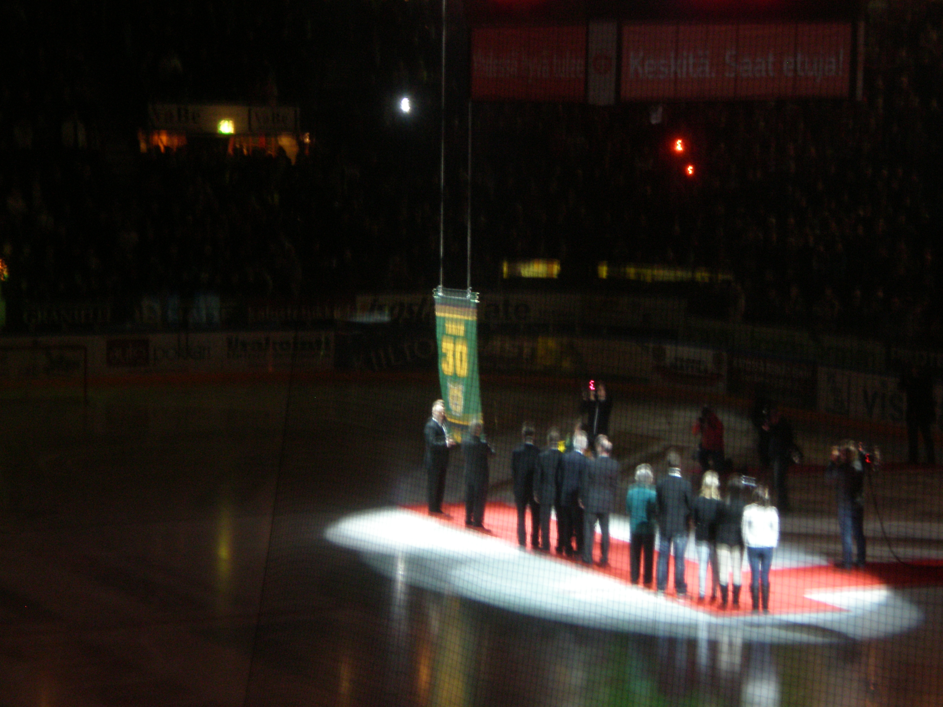 Ilveksen jäädyttää Jukka Tammen pelinumeron Unknown